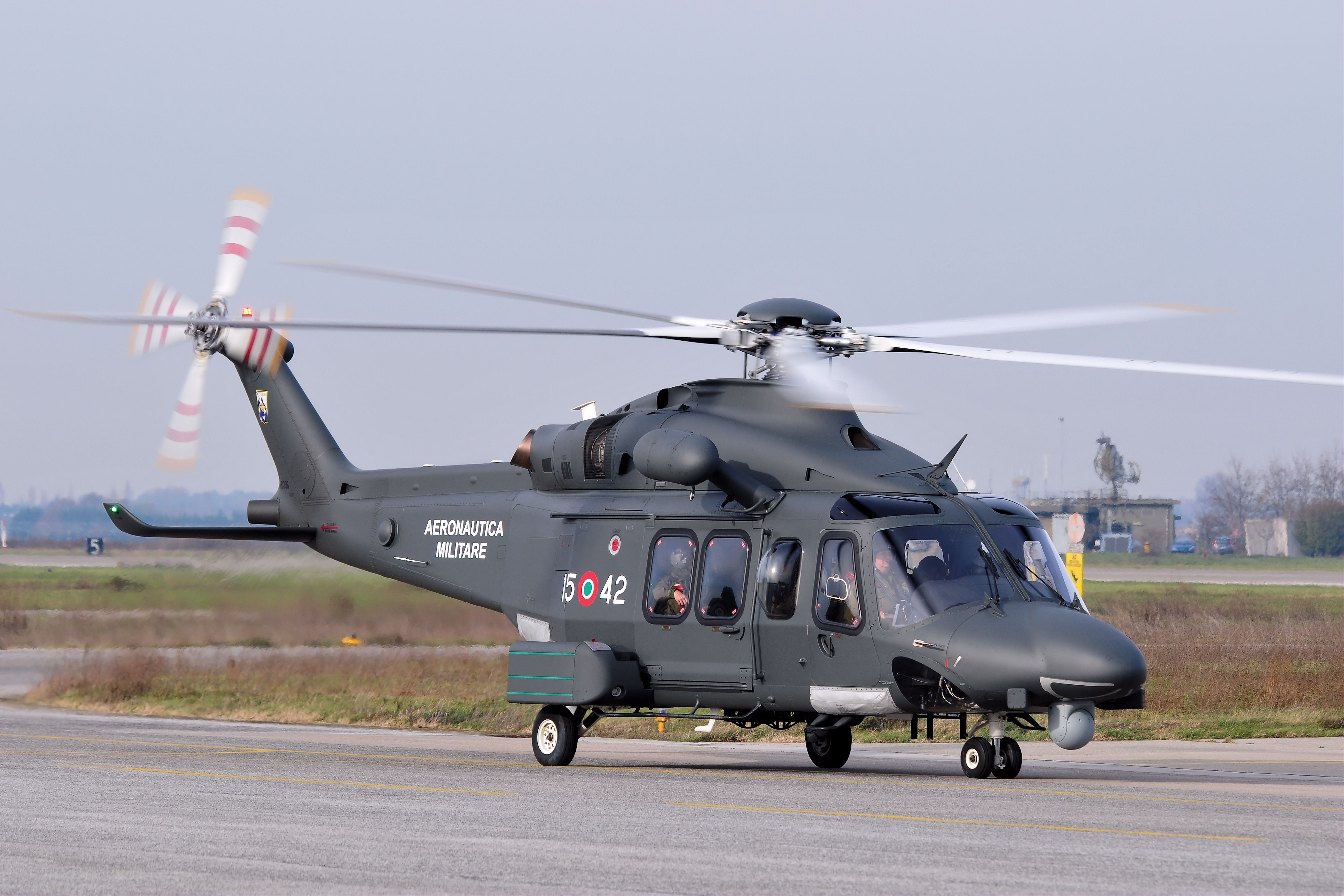 Onda 42 uno dei primi HH-139A del 15º Stomo, sulla pista di Cervia.